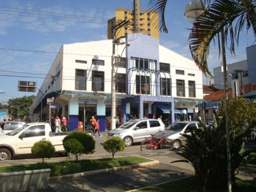 Mercado Municipal de Pouso Alegre (Minas Gerais, Brasil)